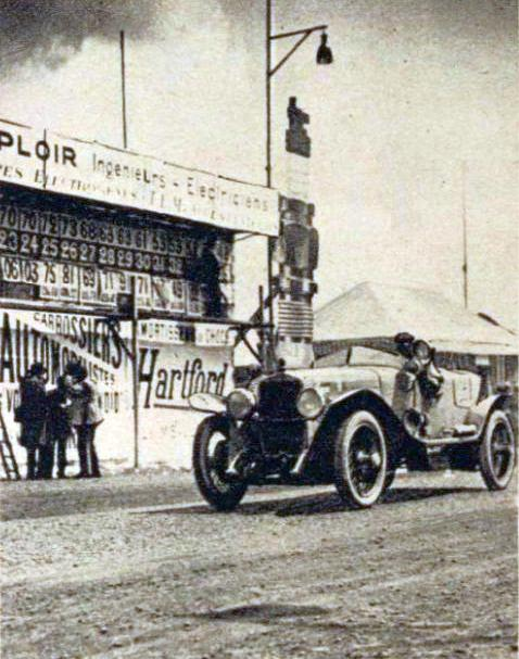 Le tableau d'affichage des 24 Heures du Mans 1923.